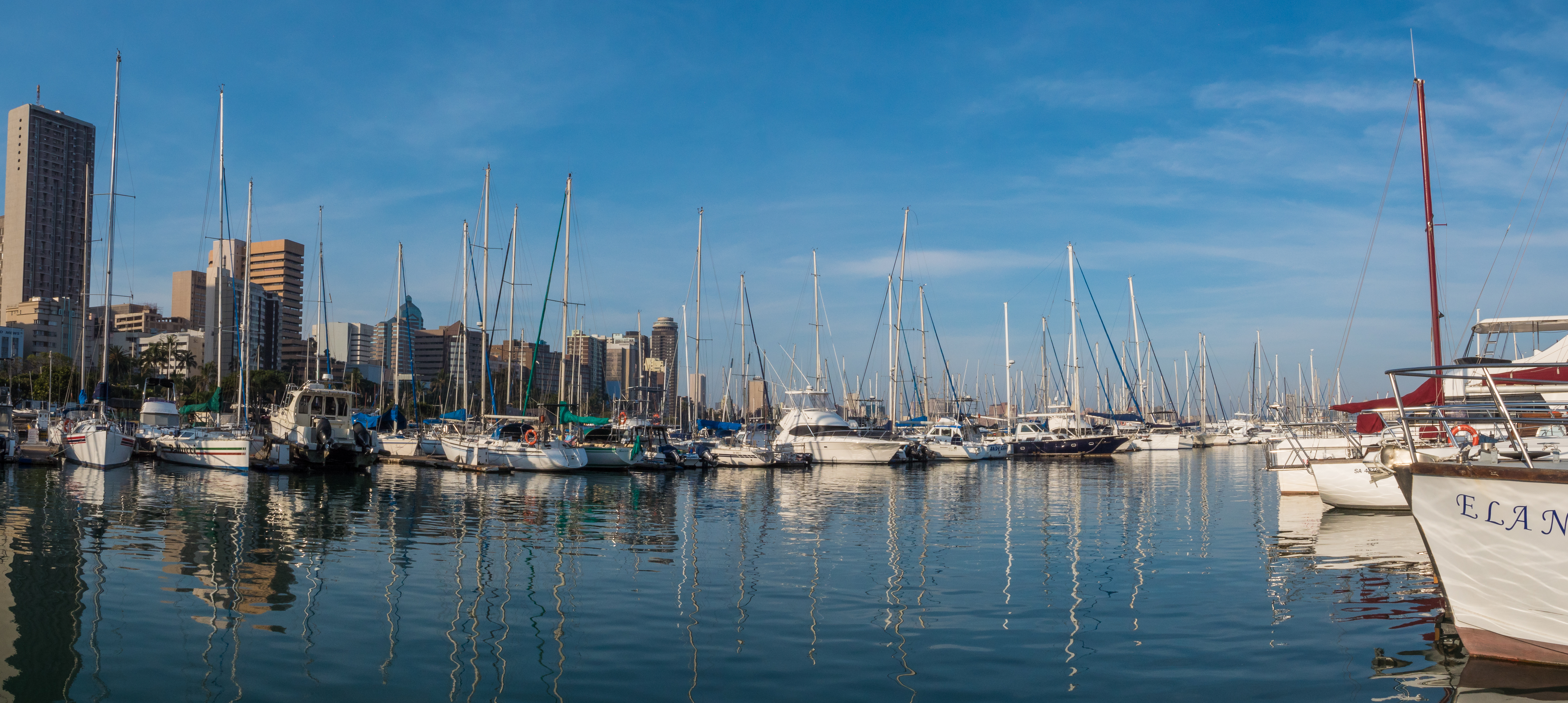 Vue du KwaZulu-Natal en Afrique du Sud.